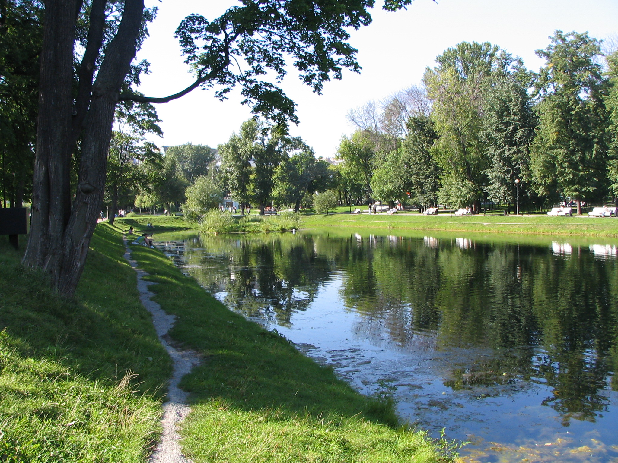 Пруд в Екатерининском парке (Москва).